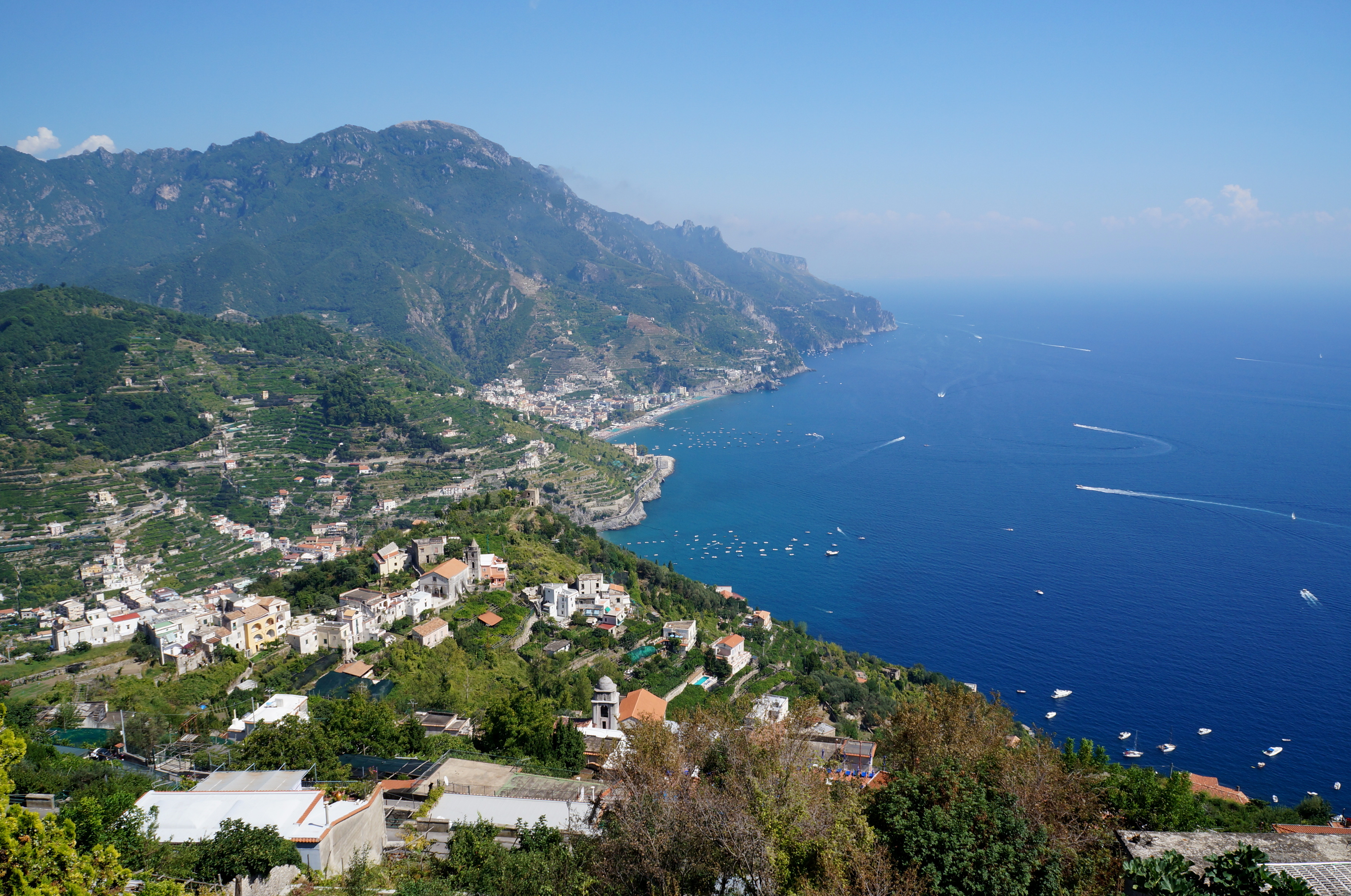 Ravello (SA), Italia.